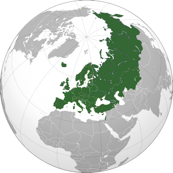 600px-UEFA (orthographic projection) Mapa UEFA